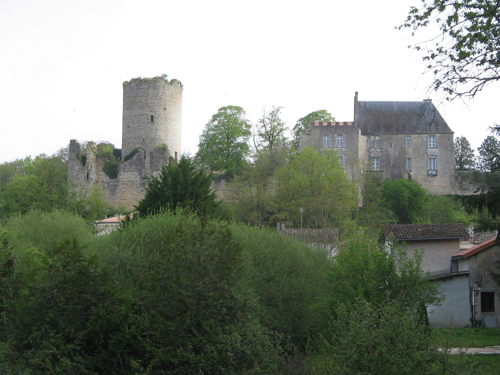 Montreuil-Bonnin en avril 2011